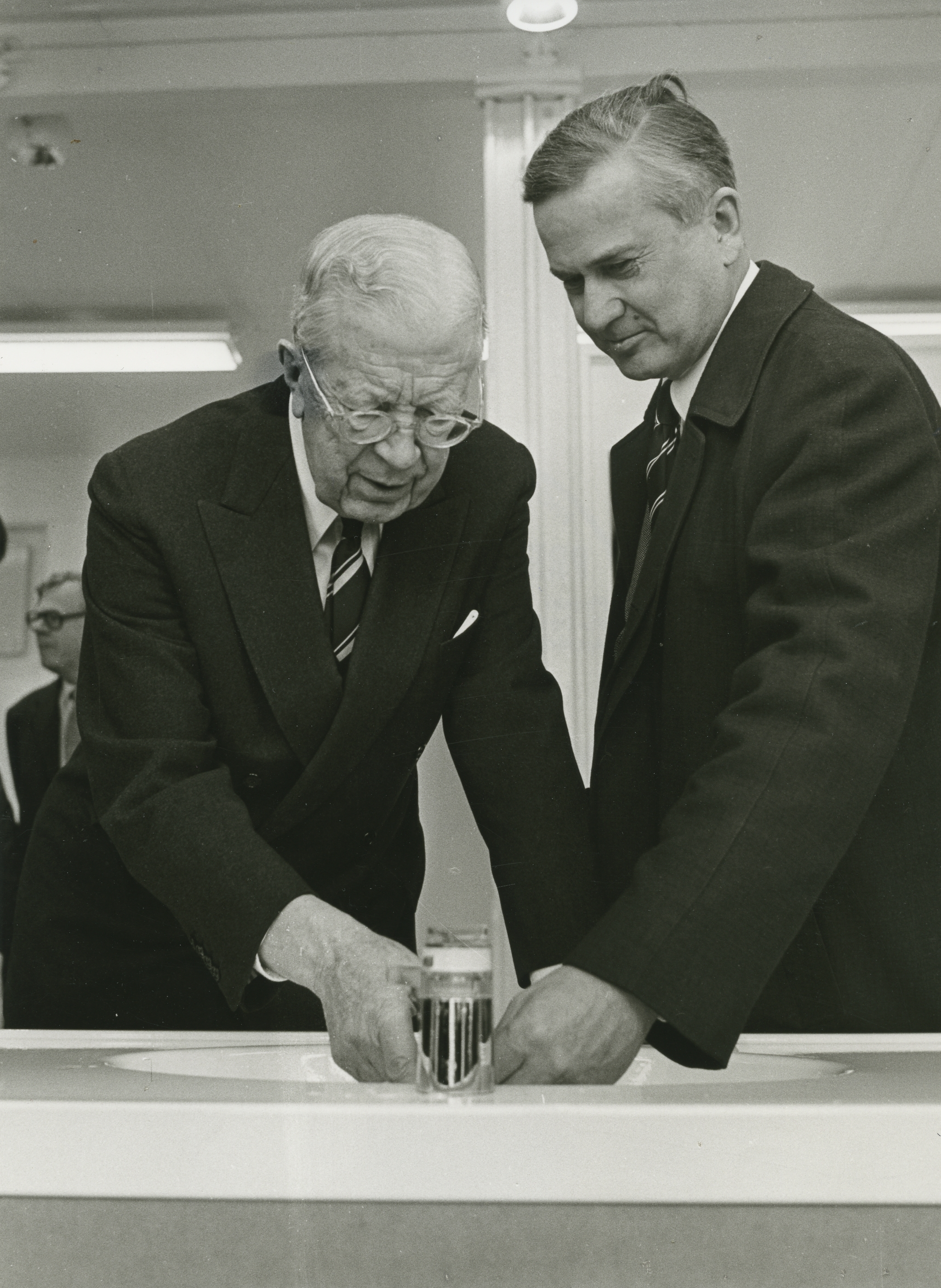 Kungligt besök på Gustavsbergs porslinsfabrik. Förevisning av handfat. Personer: Kung Gustav VI Adolf och Bertil Dahllöf, produktutvecklare, Sanitetsporslinsfabriken.